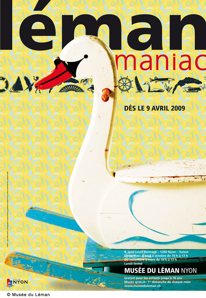 Affiche d'exposition "Léman Maniac"